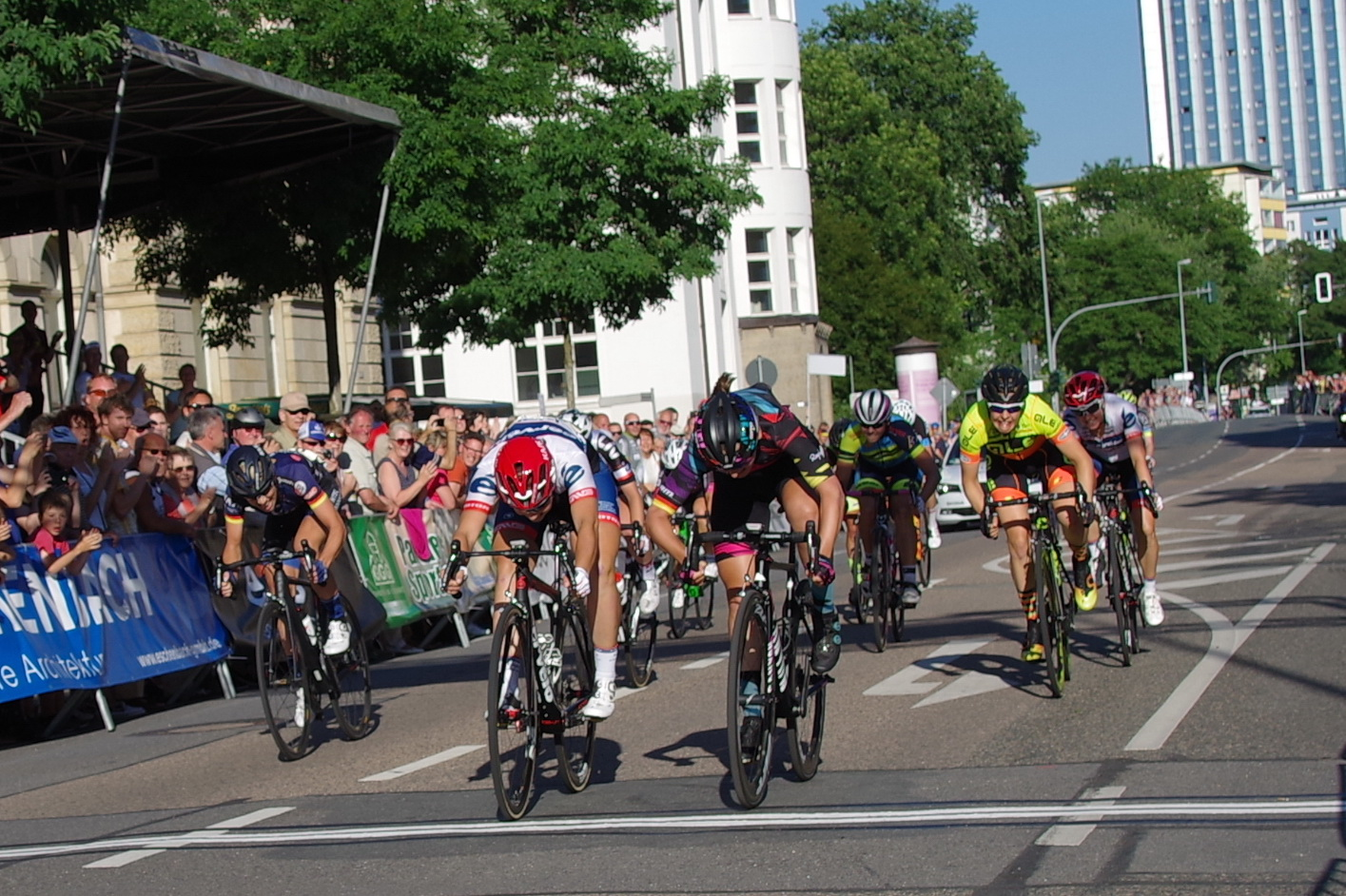 Deutsche Meisterschaften im Straßenrennen 2017 (Frauen) 24. Juni 2017 Zieleinlauf Fotofinish: Lisa Klein (1) nur knapp vor Lisa Brennauer (2), Charlotte Becker auf Platz 3 The making of this document was supported by the Community-Budget of Wikimedia Germany.